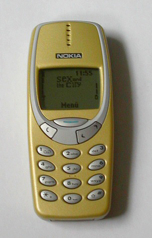 Nokia 3310 Sahara Gelb (Eisleben, 25. März 2005)